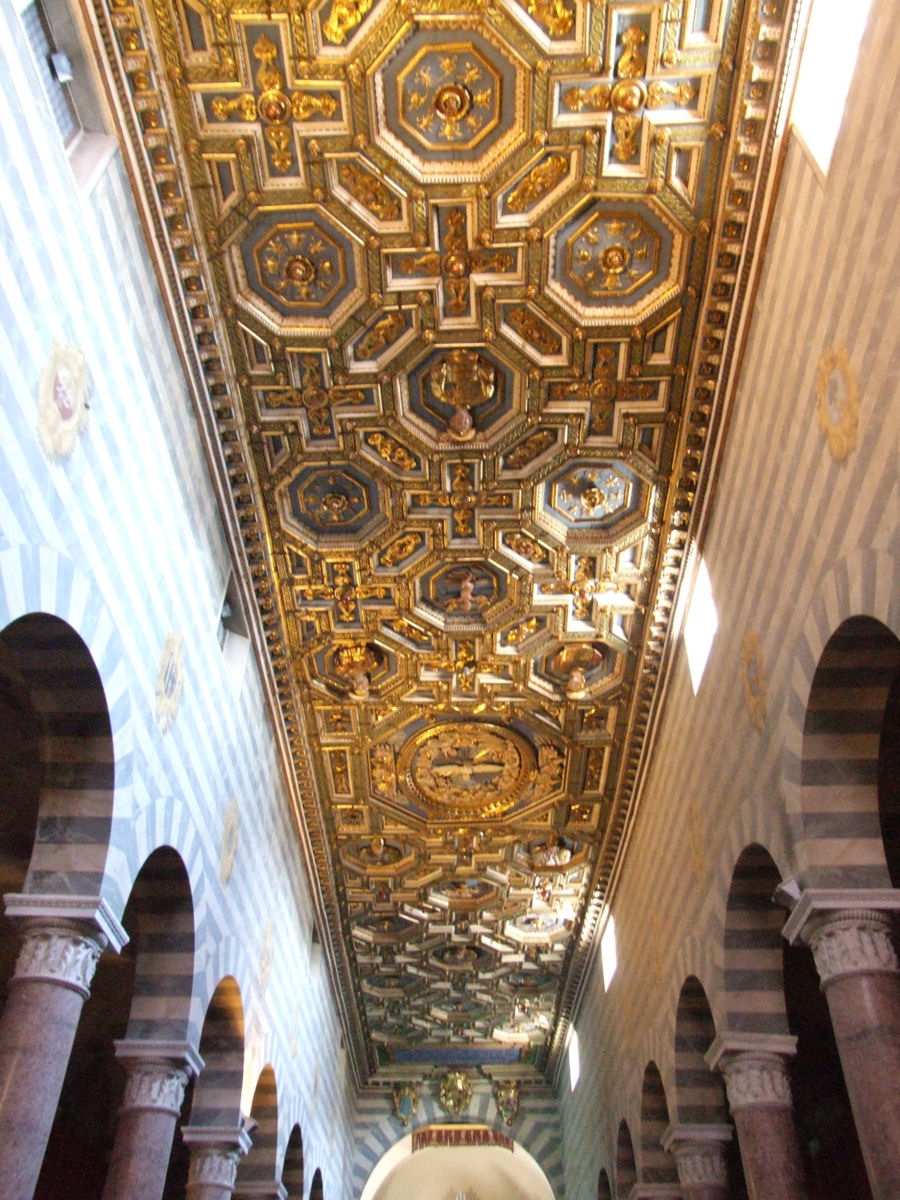 Duomo di Volterra (Volterra Cathedral), Volterra, Italy - Coffered ceiling